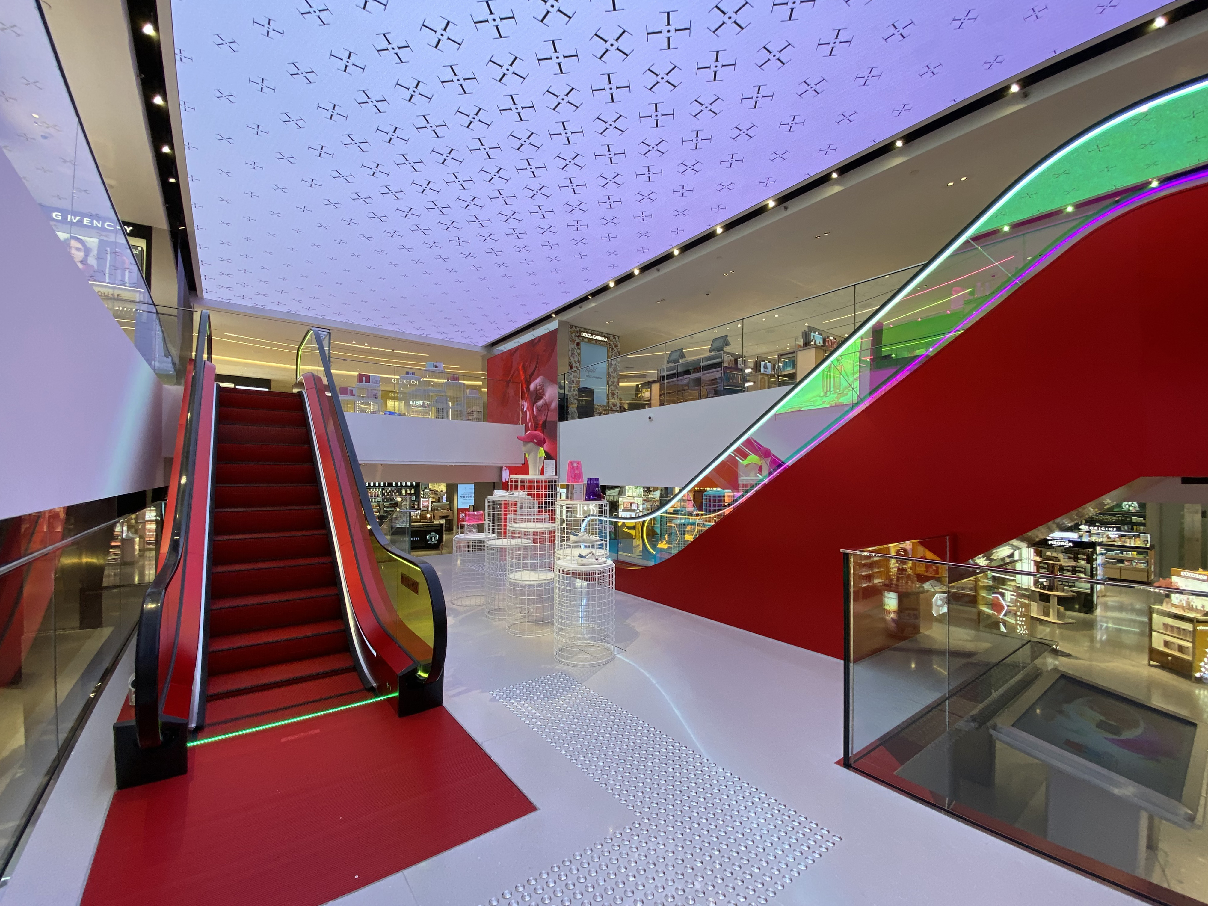 Lippo Sun Plaza T Galleria New Atrium